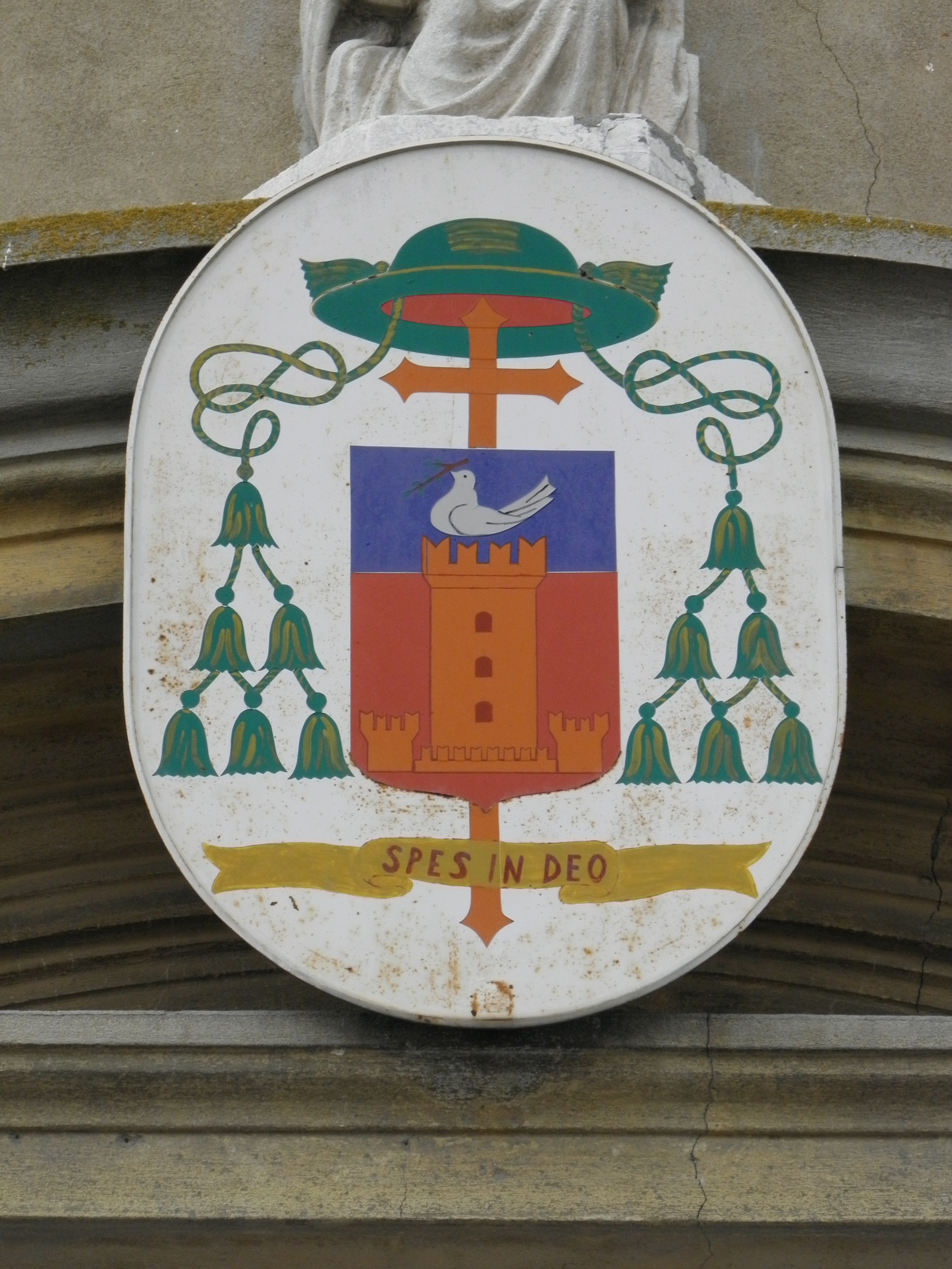 Stemma vescovile di Martino Gomiero, Chiesa di San Zenone, Borsea, frazione di Rovigo.